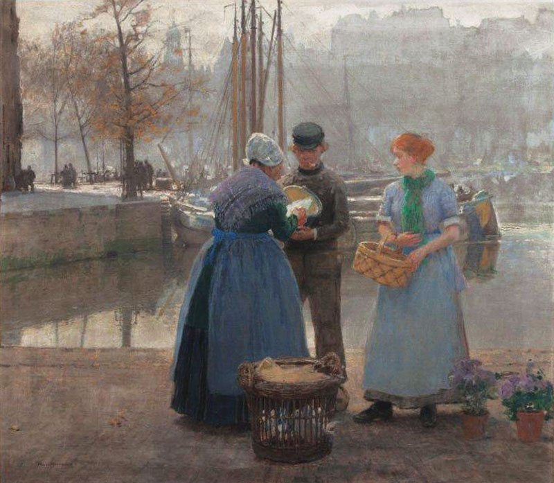 "Herbstmorgen in Rotterdam". Öl auf Leinwand, 101 x 116,5 cm, links unten signiert "Hans Herrmann", auf dem Keilrahmen auf Künstleretikett betitelt.